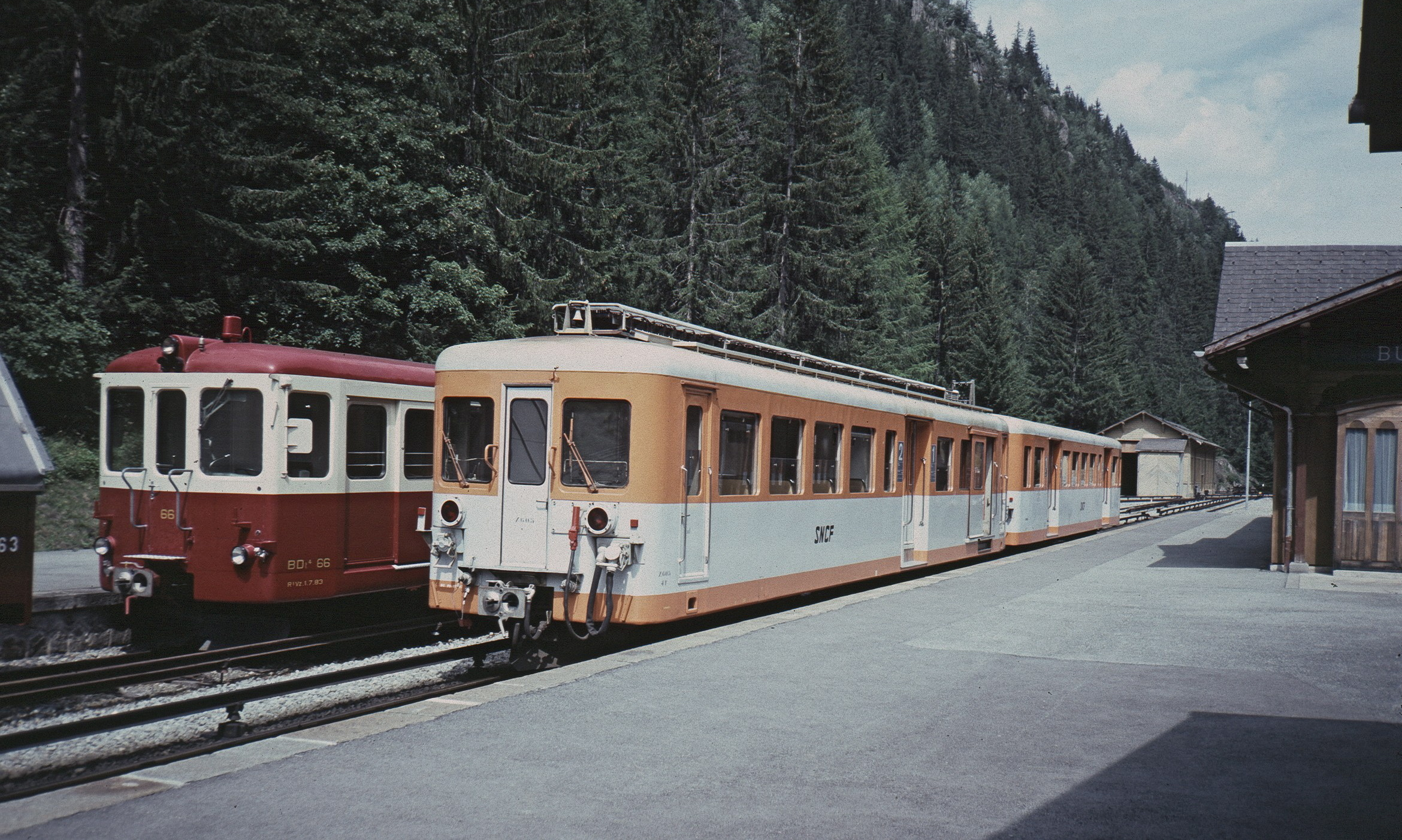 Deux rames en gare du Châtelard-Frontière